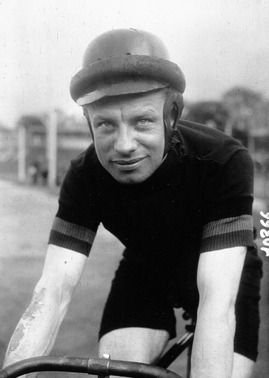 Concours cyclistes : Vanderstuyff, avec casque : [photographie de presse] / Agence Meurisse